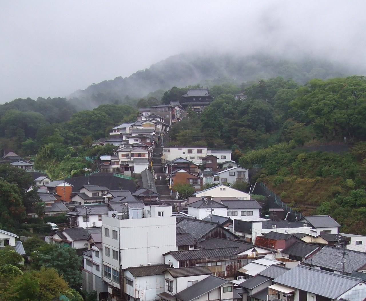 金刀比羅宮の参道